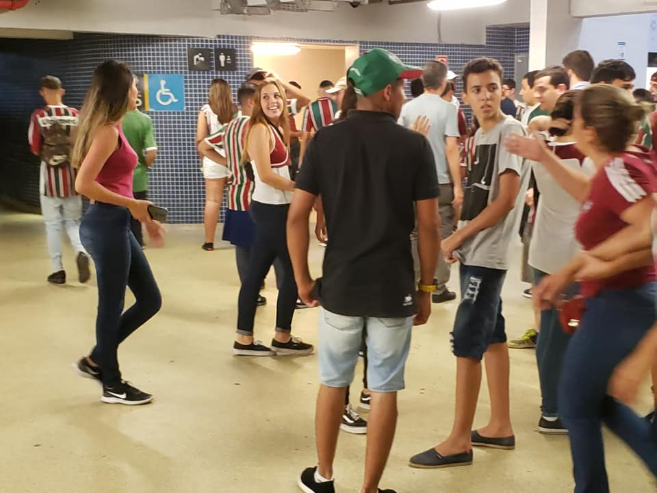 Torcida do Fluminense Footbal Club no corredor do Maracanã antes do empate do clube por 0 a 0 em 4 de dezembro de 2019, perante 39.965 torcedores.